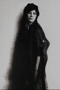 Vladimír Jindřich Bufka, Portrét Marie Bufkové, po 1910 zelená glazura fotografie na papíře 229 x 170 mm Portrét komponovaný téměř jako pouhá silueta portrétované ženy, zahalené v černých splývavých šatech. (Nápadně stejně aranžovaný portrét vznikl v roce 1911 v předním vídeňském ateliéru d´Ora - jeho modelem byl ovšem muž.)